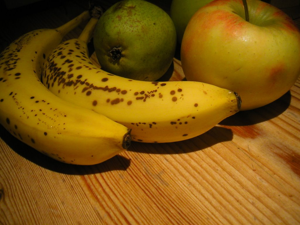 Frugt